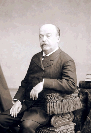 Francisco García Calderón Landa (1834 - 1905) jurista peruano que fue Presidente del Perú durante un breve periodo en 1881.